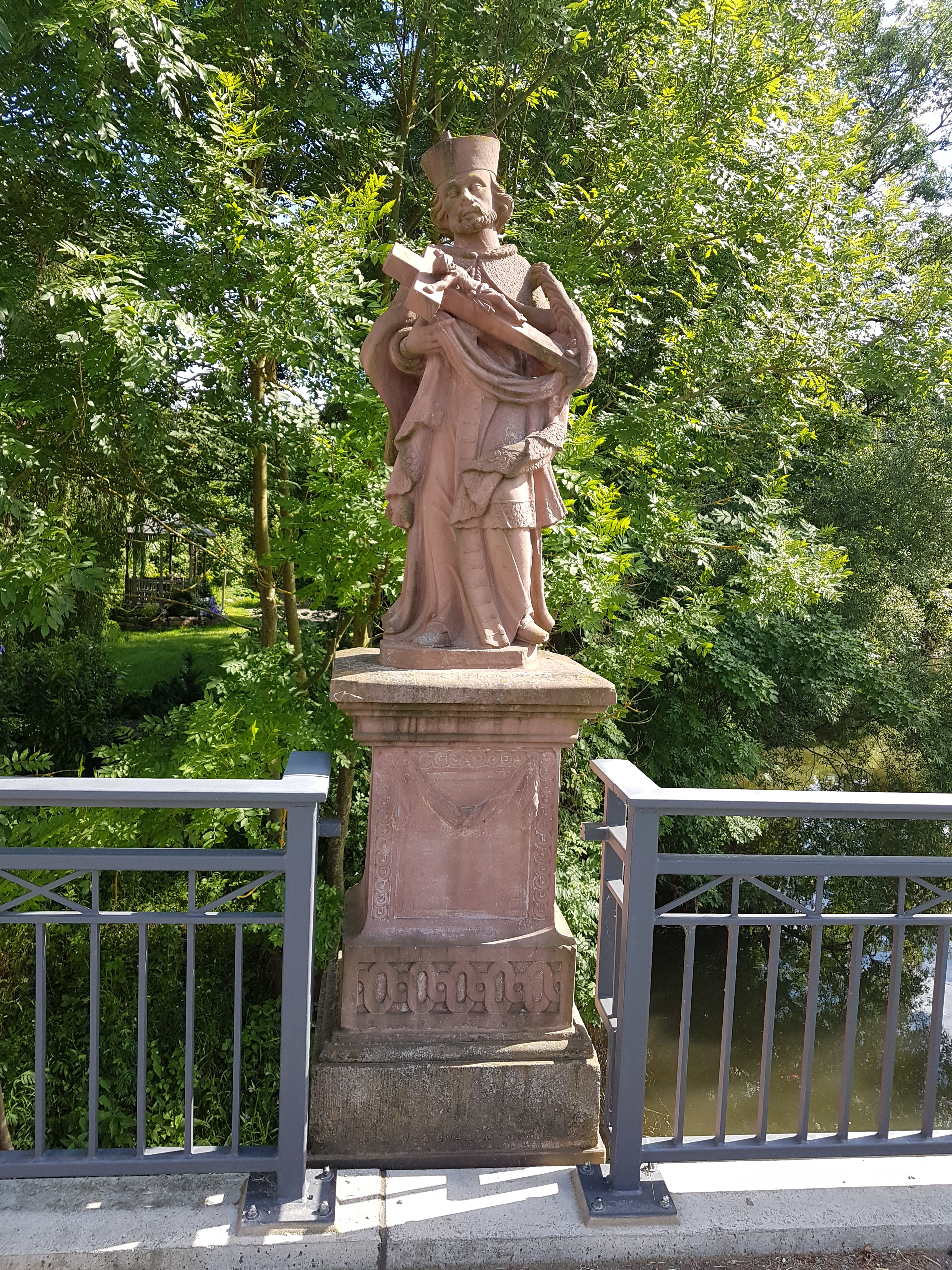 Hl. Nepomuk Tauberbrücke Impfingen